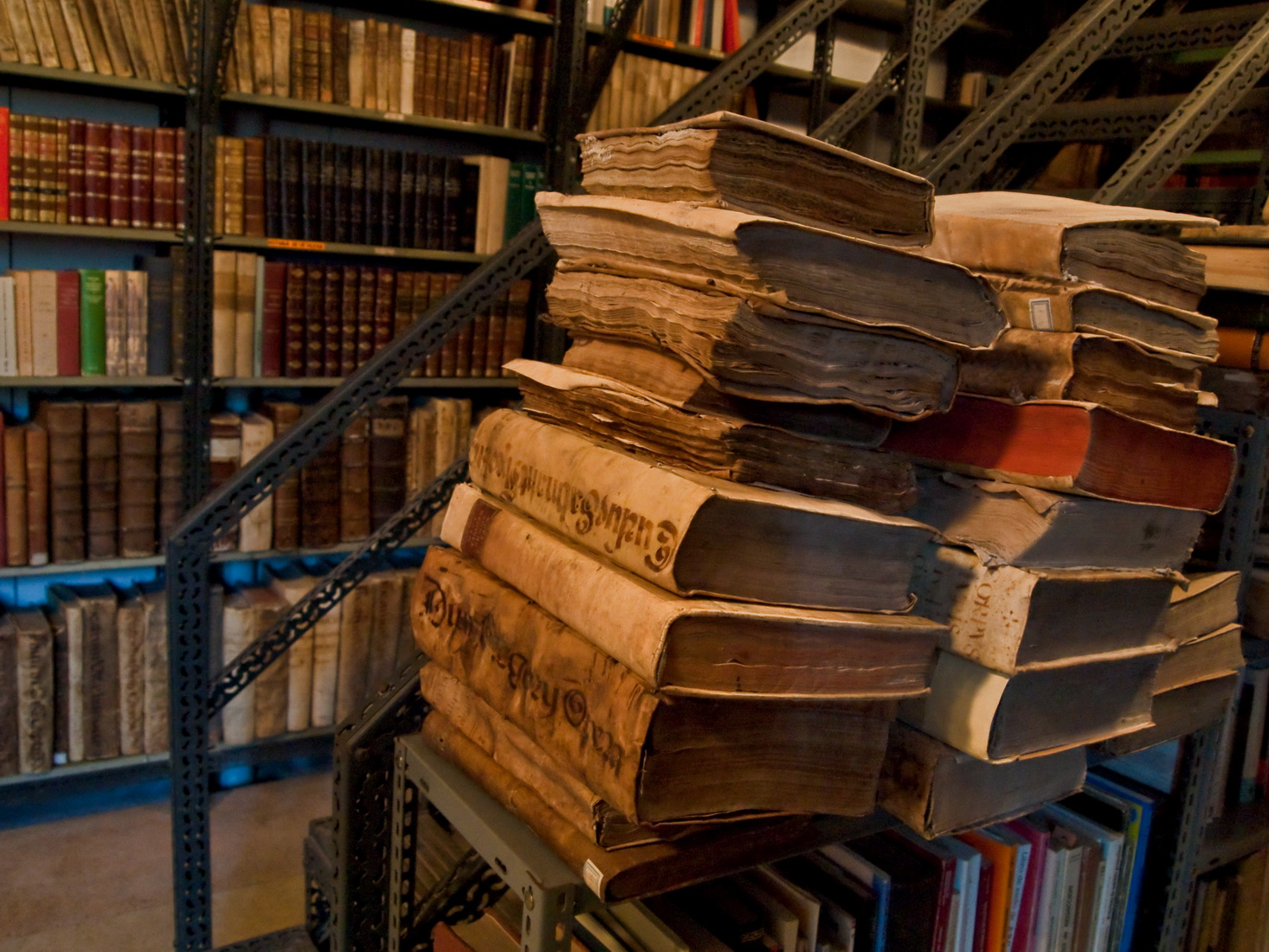 Biblioteca del Monasterio de Samos